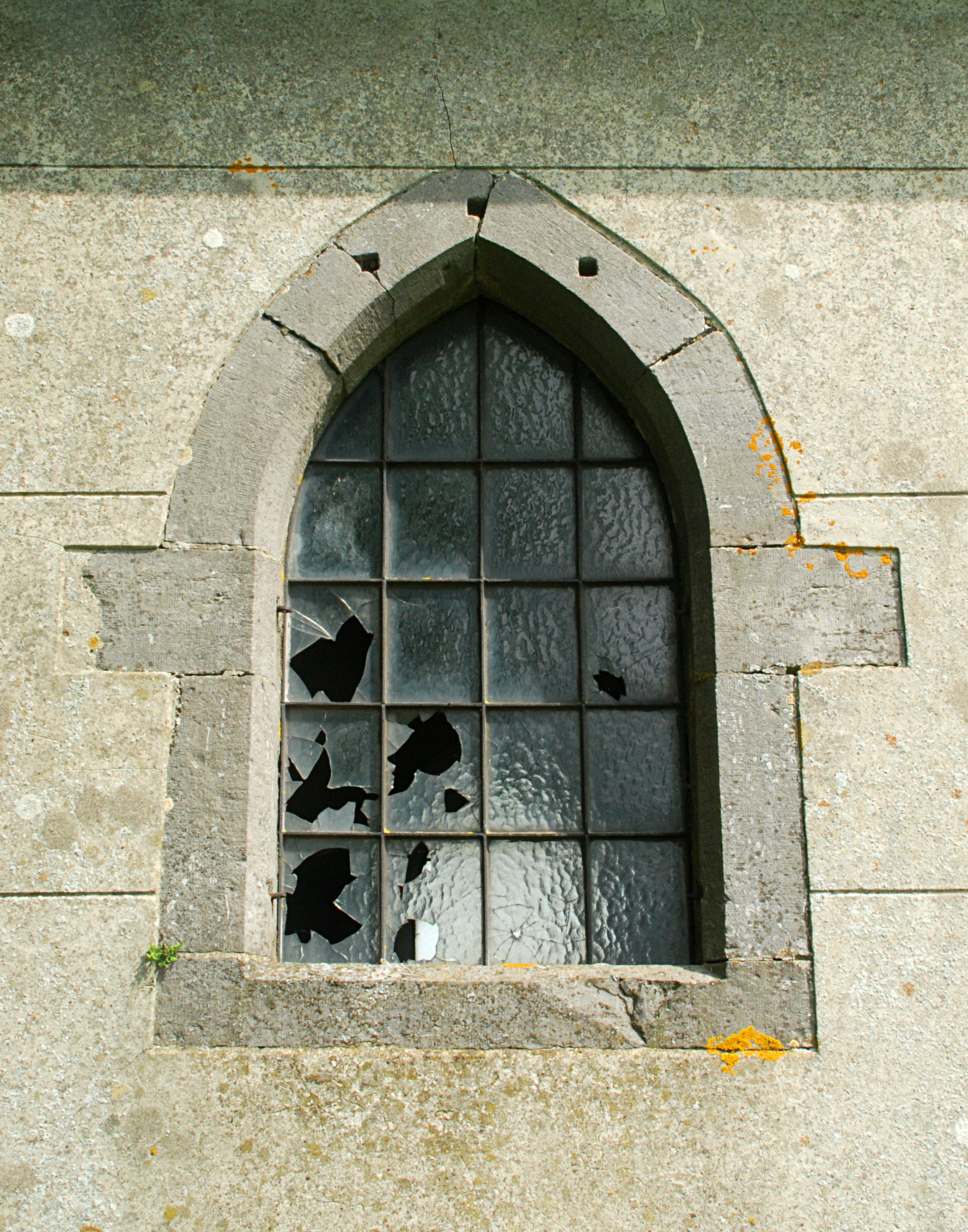 Belgique - Brabant wallon - Villers-la-Ville - Marbais - Chapelle Notre-Dame Auxiliatrice du Triolet